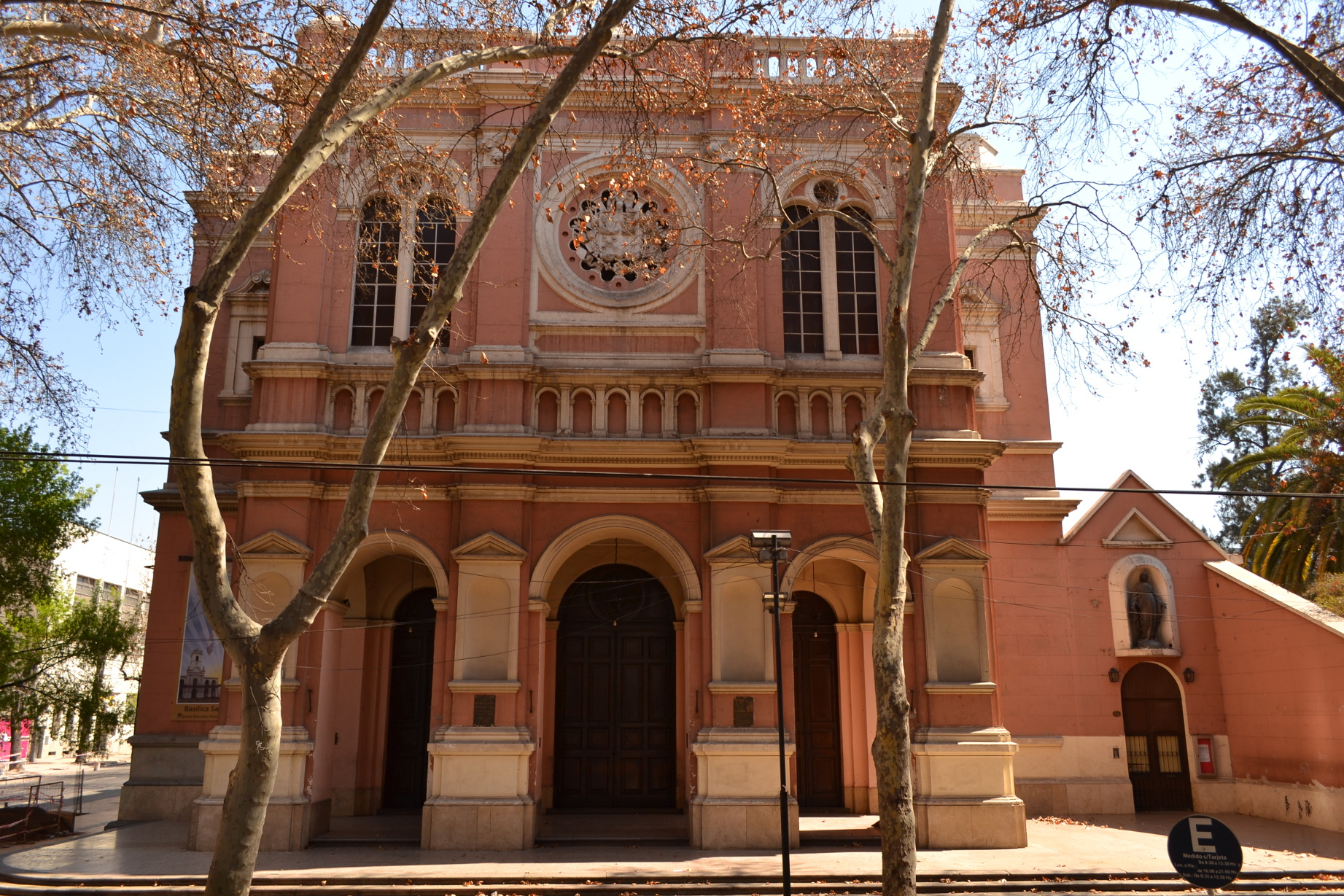 Basílica de San Francisco (y Convento Franciscano). Monumento Histórico Nacional. Avenida España 1418, ciudad de Mendoza.